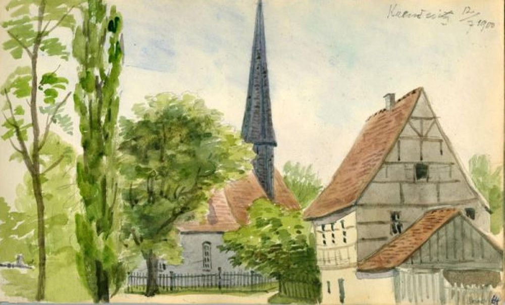 In Kreudnitz, Sommer 1900. Aquarell von Heinrich Georg Drescher